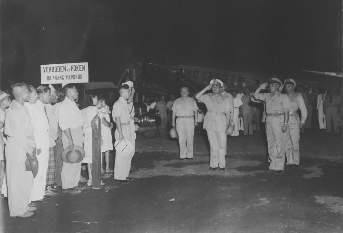 Foto. De minister-president van Oost-Indonesië, Ide Anak Agung Gde Agung, na zijn aankomst op vliegveld Mapanget op Celebes